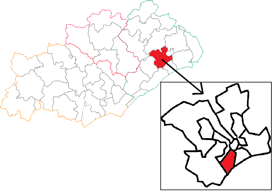 Situation du canton dans le département de l'Hérault.